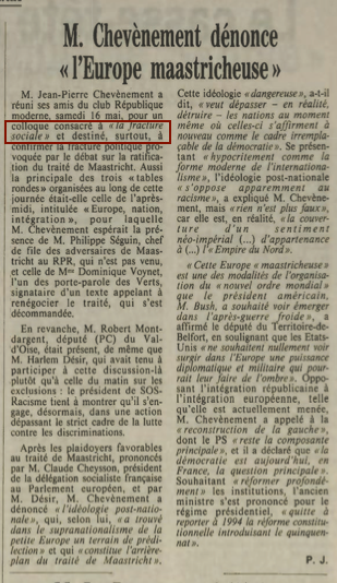 Article du Monde du 19 mai 1992 annonçant le coloque sur la "Fracture Sociale" (cadre rouge) organisé par M. Chevènement